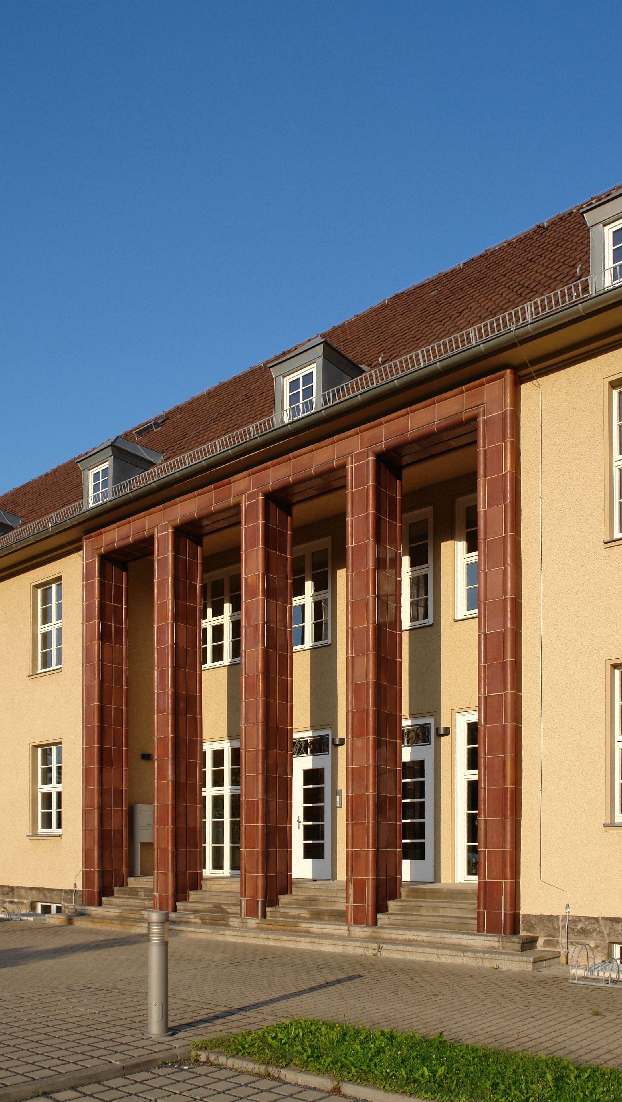 Luftkriegsschule Dresden Junkers-Ring5